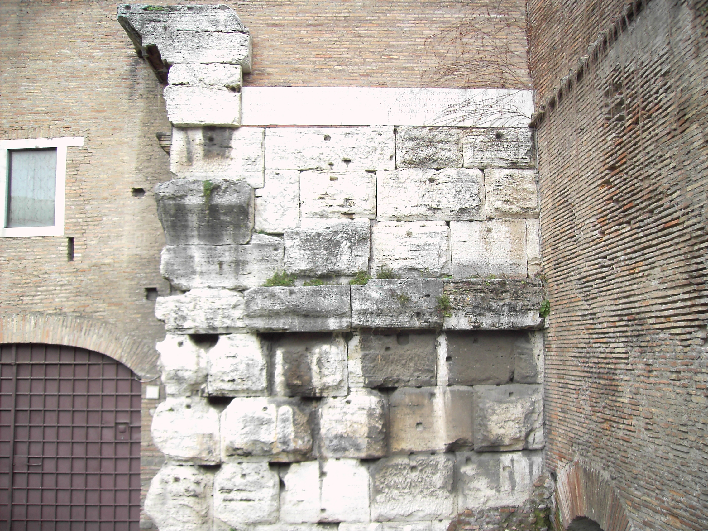 Roma, Basilica dei santi Giovanni e Paolo al Celio - Resti del tempio romano del Divo Claudio alla base del campanile.